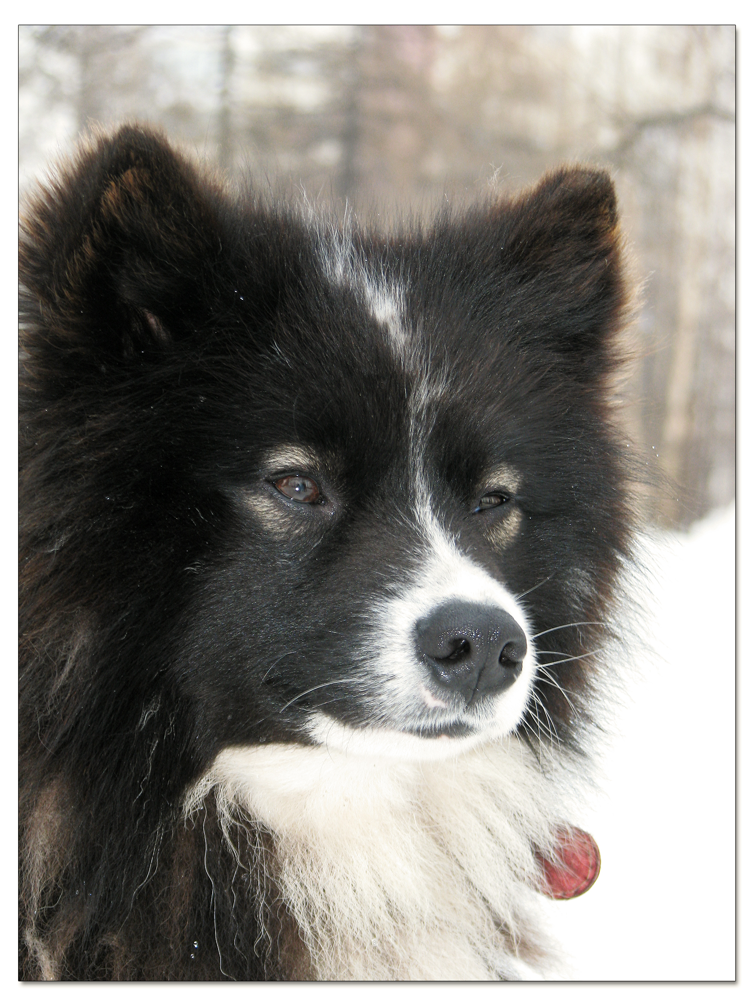 ненецкая оленегонная лайка, оленегонка, ненецкая лайка